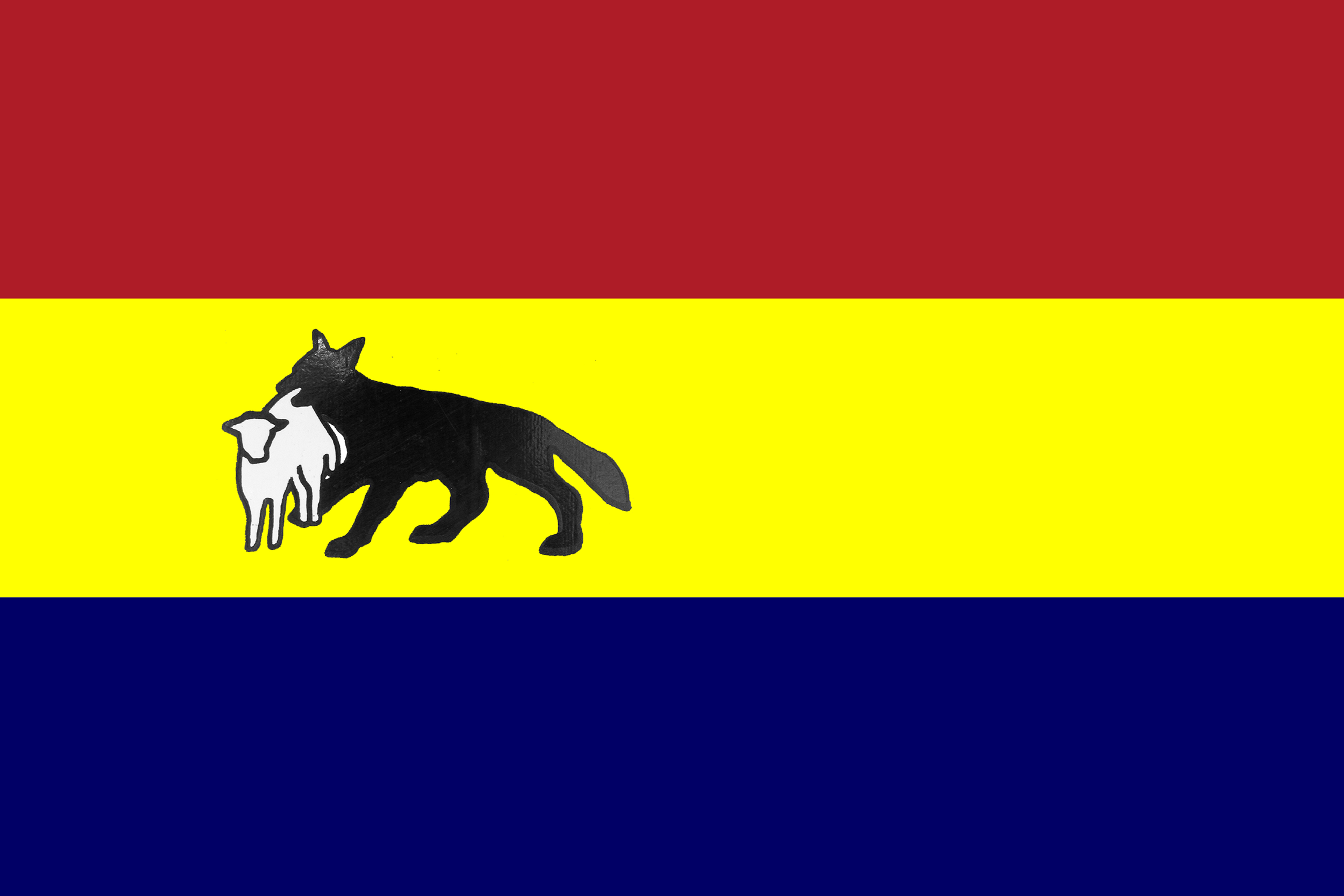 Vlag van Meise